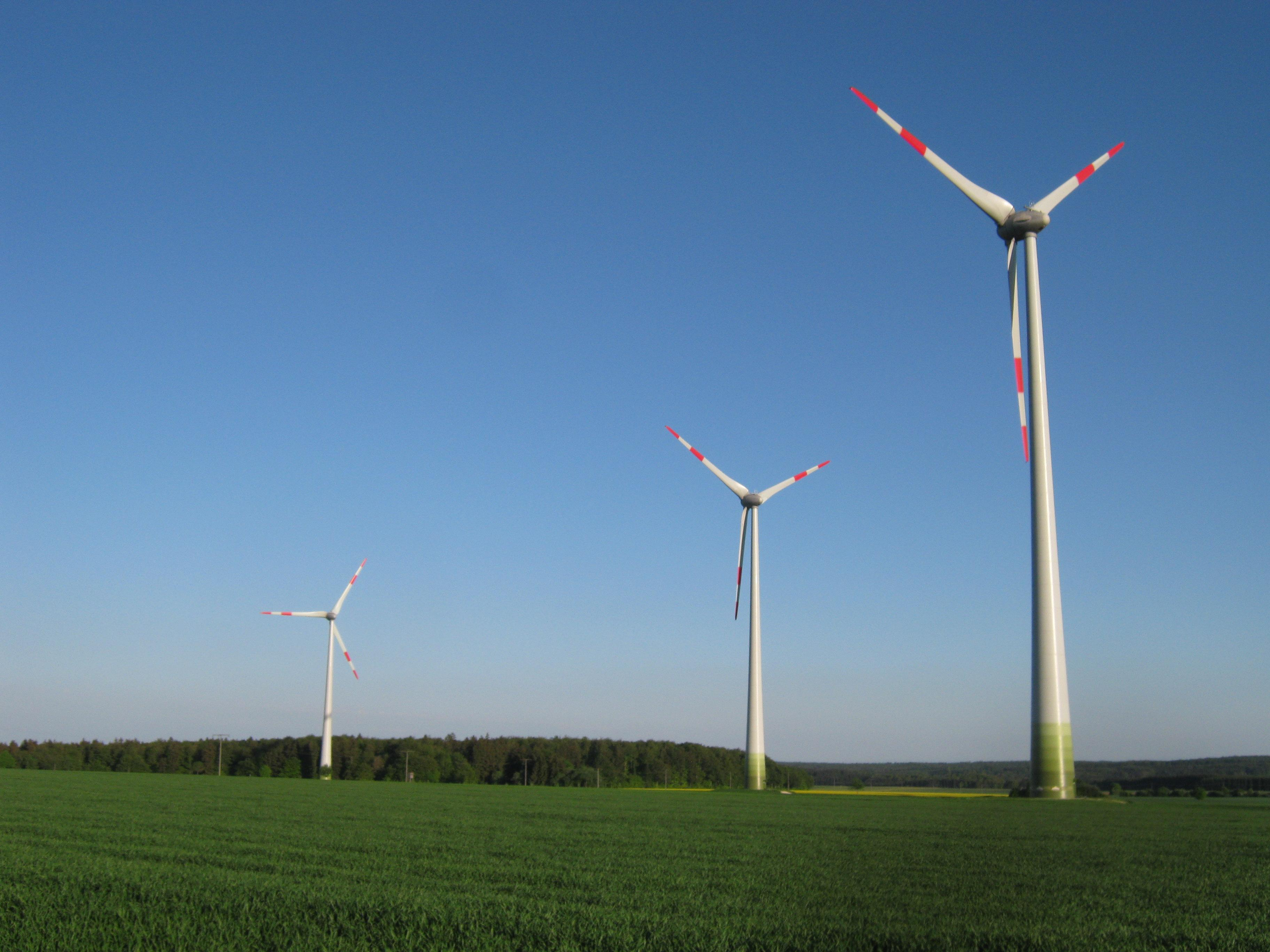 Windräder Nummer 5,6 und 7 des Windparks Gnannenweiler